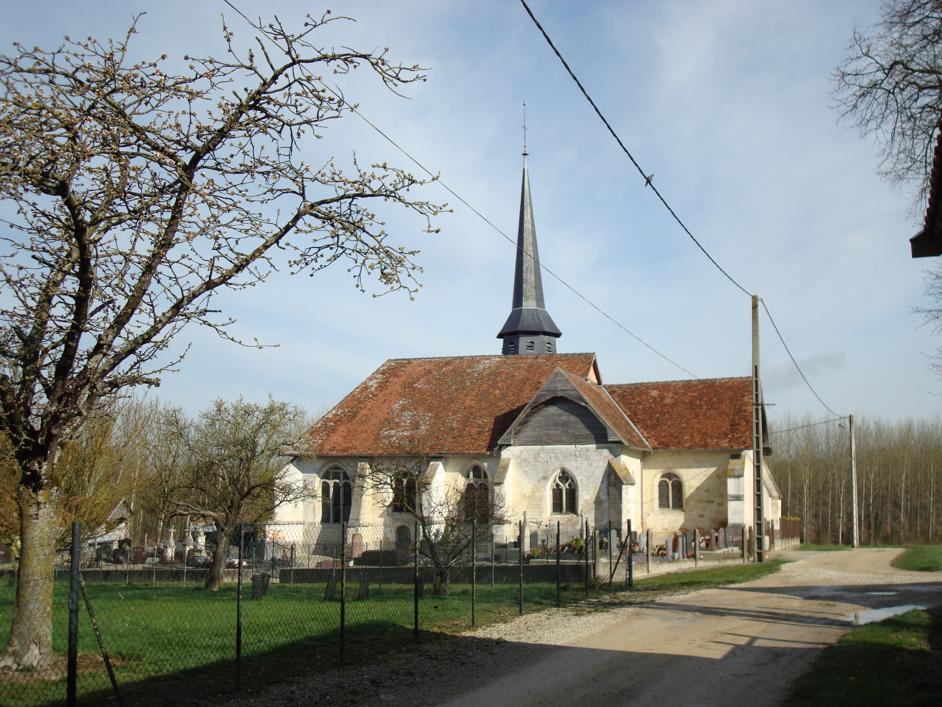 Braux (Aube) : église